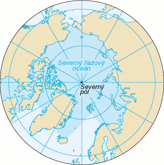 sk modifikacia z en verzie Arctic Ocean.png